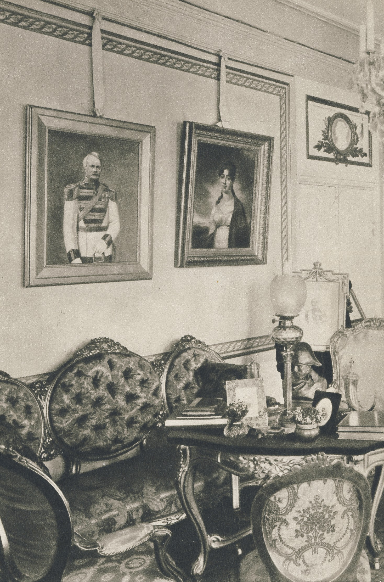 "Clason-Hebbeska huset" vid Skeppsbron 18 i Stockholm, interiör